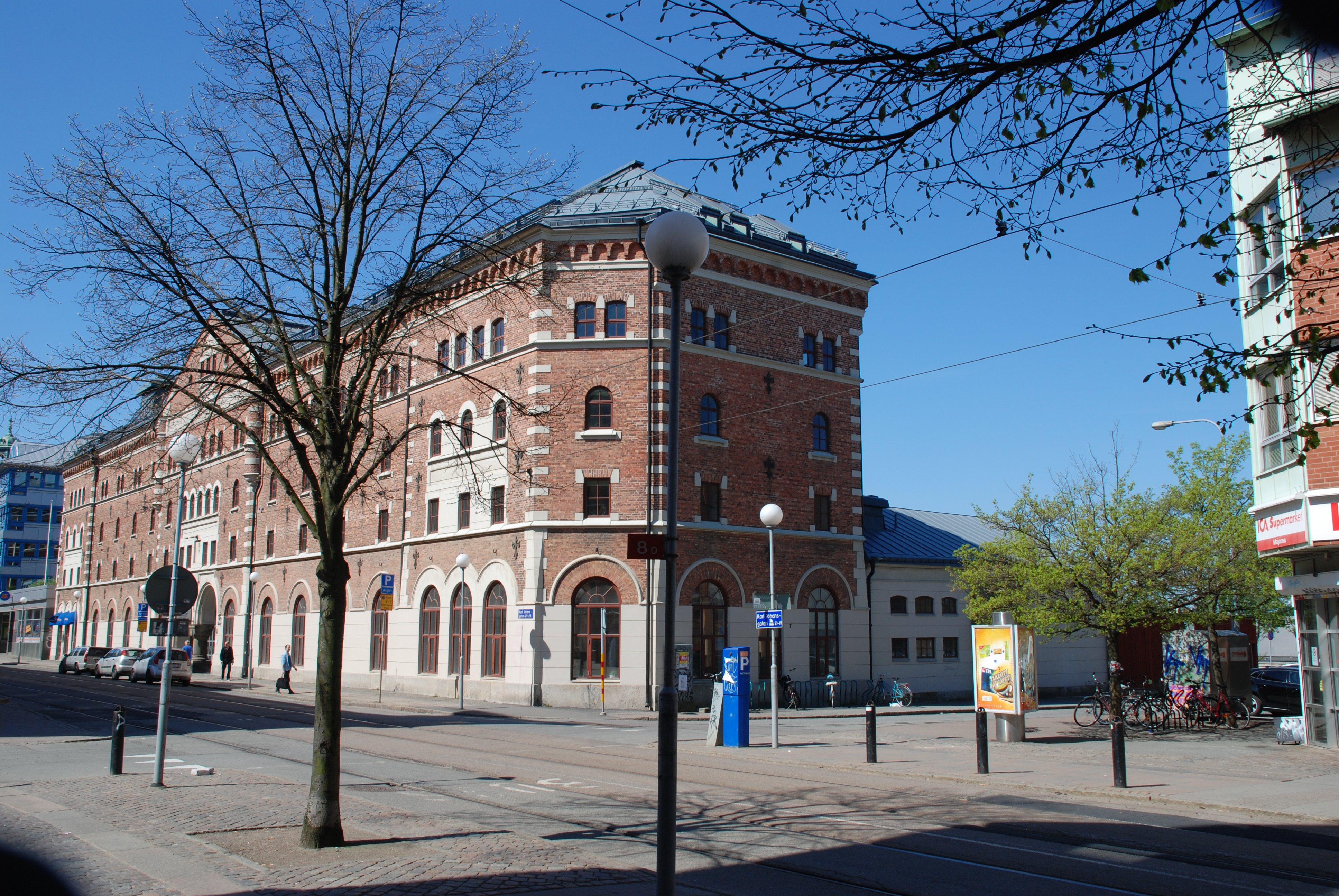 Före detta Kronans bryggeri, Karl Johansgatan 23-29, i stadsdelen Majorna i Göteborg.